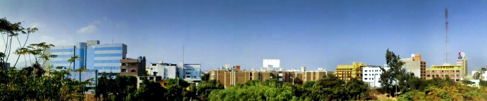 Panorámica de la ciudad de Trujillo - Perú